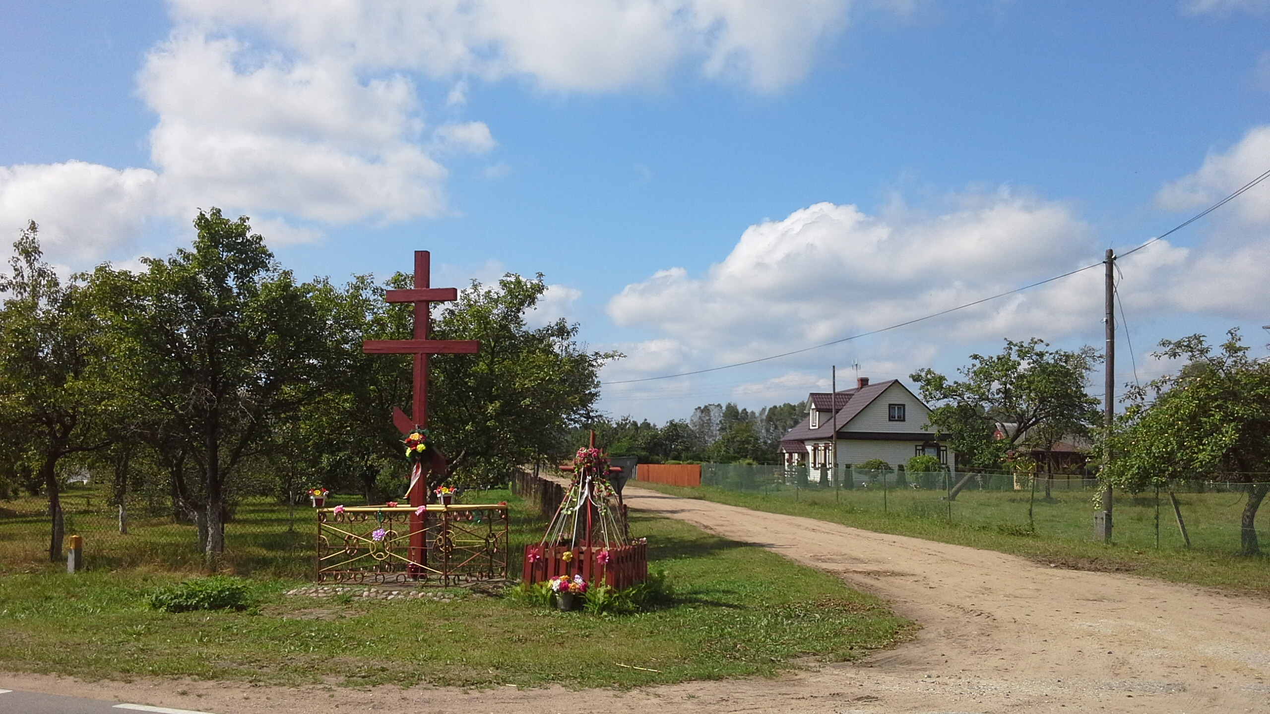 Centrum wsi Nowosiółki